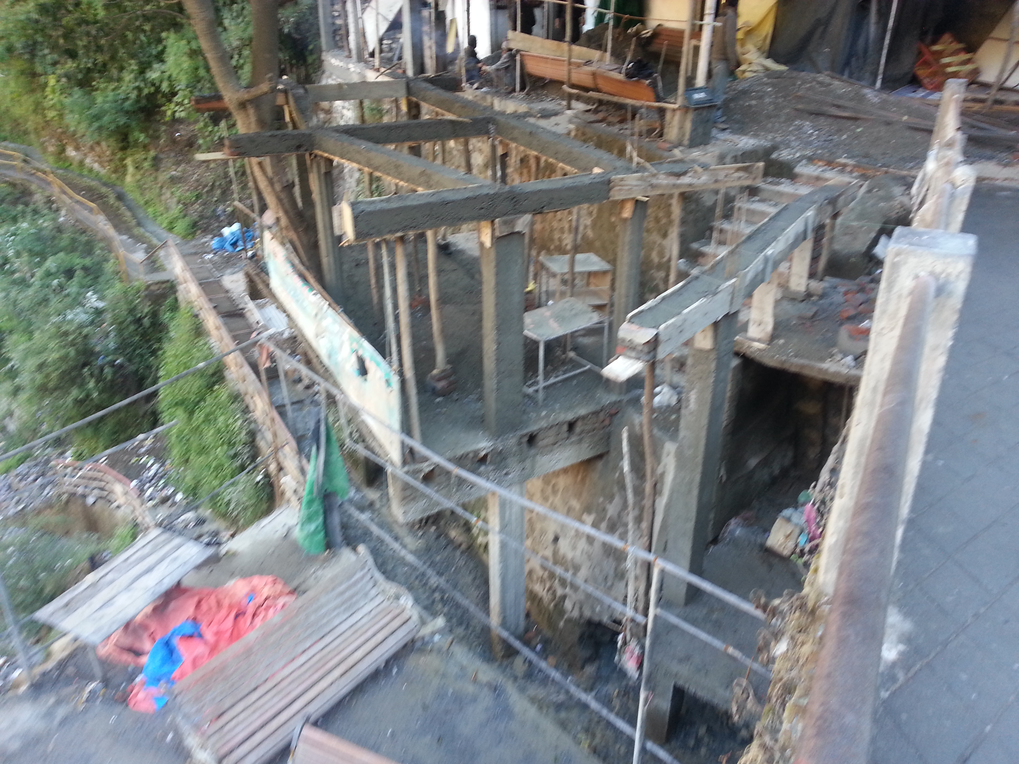 केम्पटी जलप्रपात क्षेत्र में होने वाला अनियंत्रित और घटिया निर्माण कार्य।